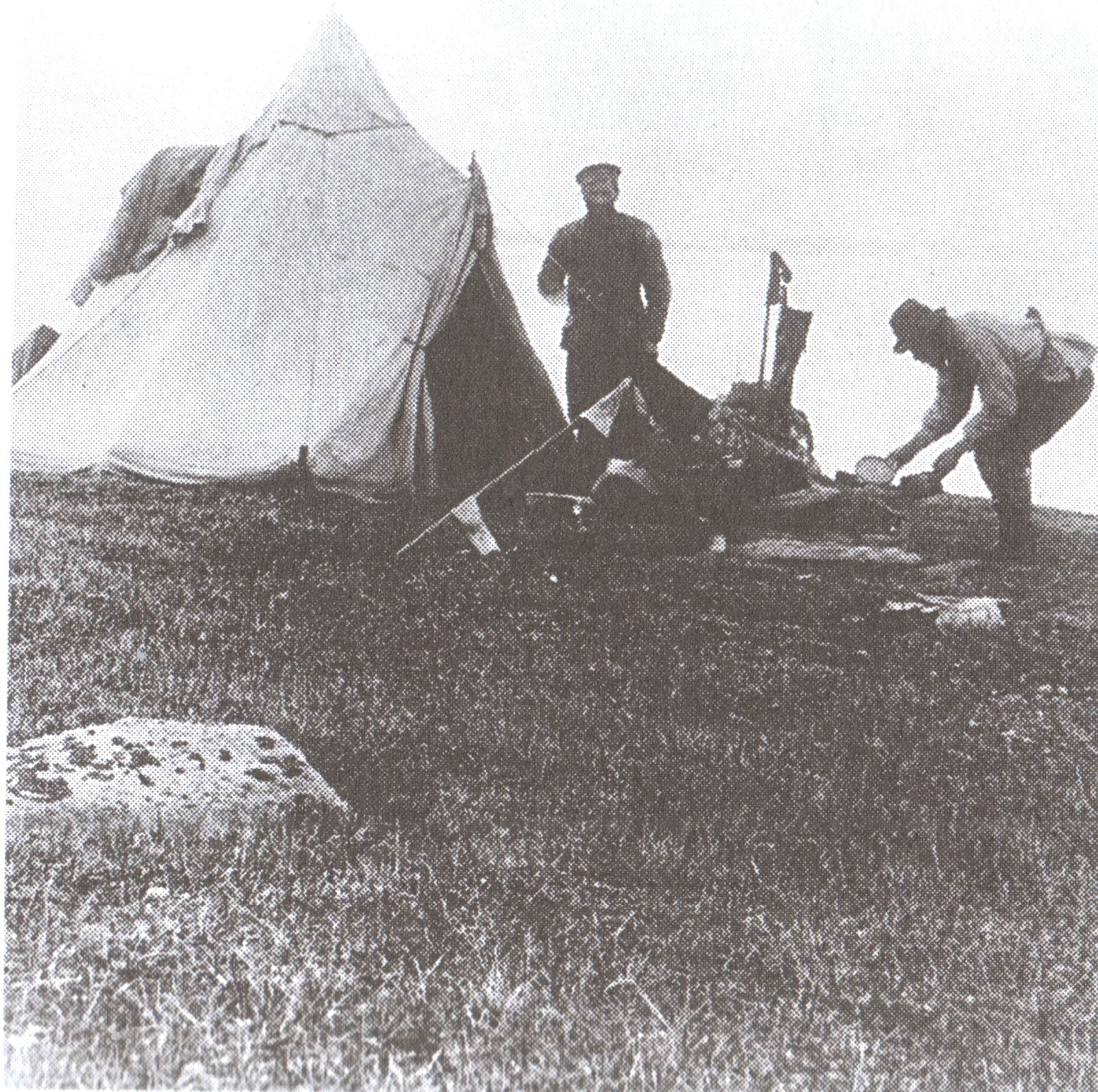 Лагерь Русской полярной экспедиции на о-ве Котельный. У палатки стоит А.В. Колчак.